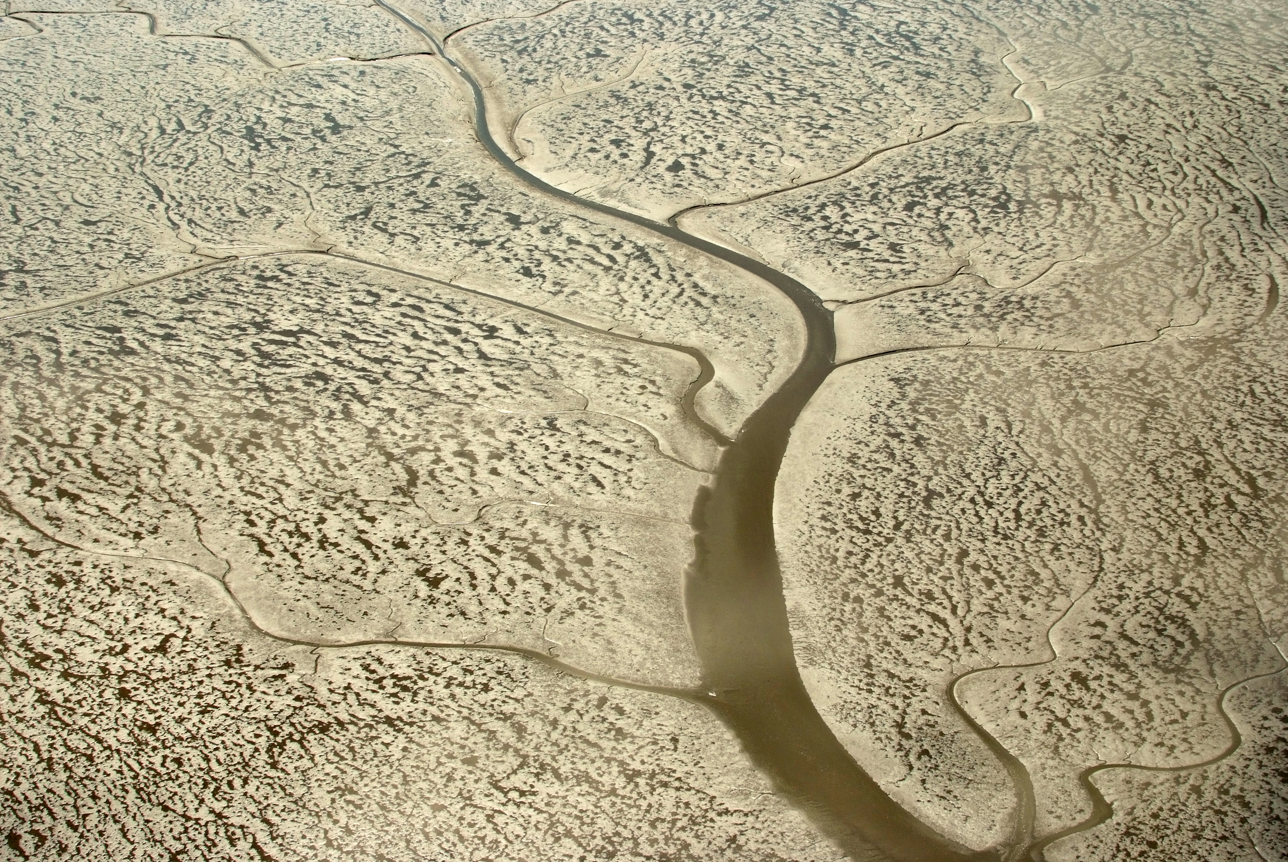 Fotoflug vom Flugplatz Nordholz-Spieka über Bremerhaven, Wilhelmshaven und die Ostfriesischen Inseln bis Borkum Priel im Wattenmeer an der Nordseeküste